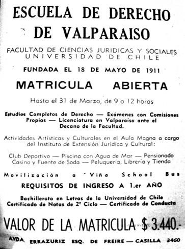 Antigua promoción para matrículas de la Escuela de Derecho de Valparaíso, Universidad de Chile, Sede Valparaíso.